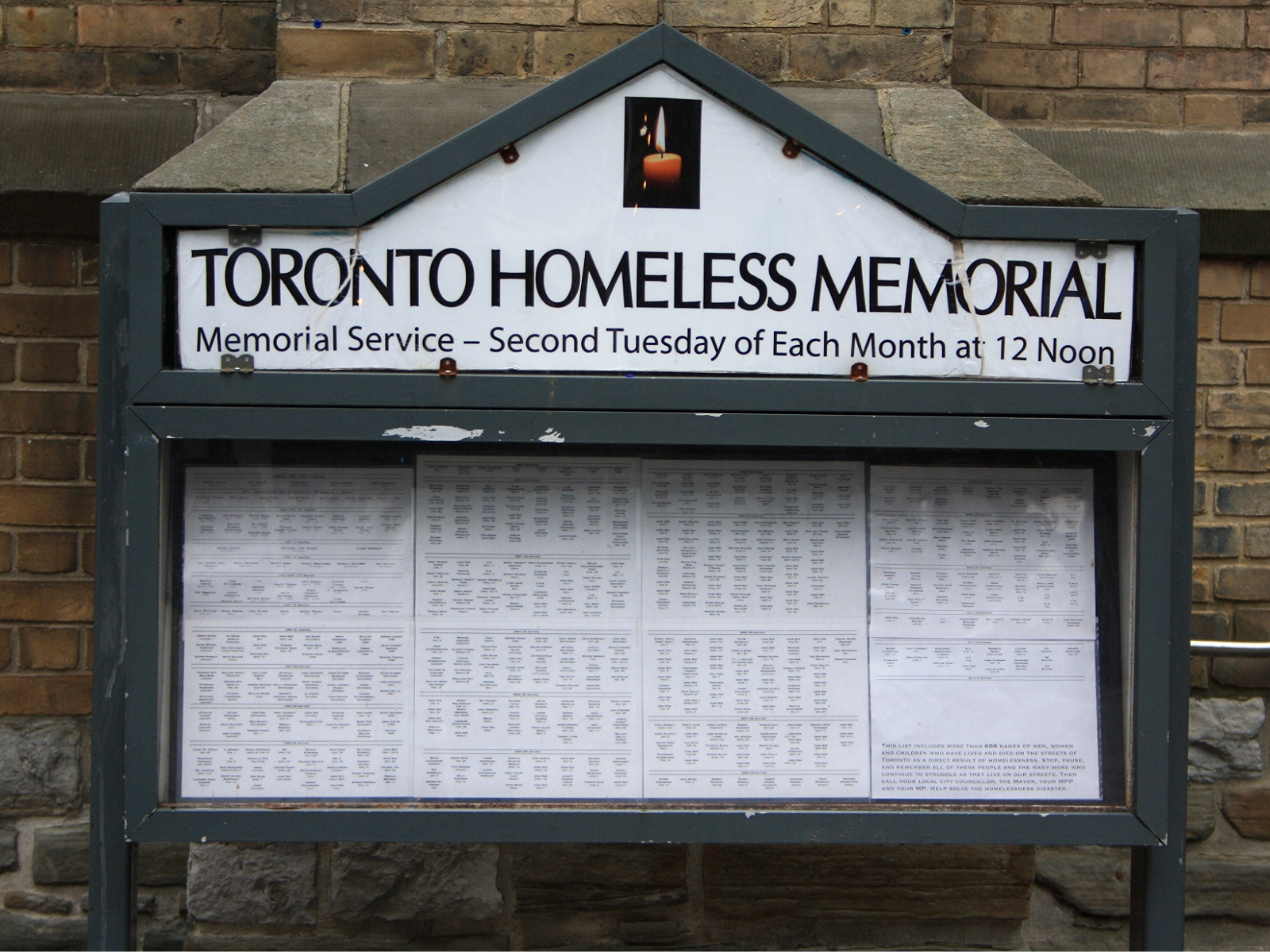 Toronto Homeless Memorial